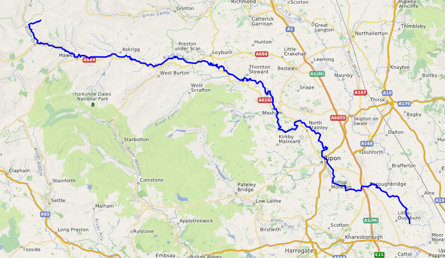 carte réalisée sur umap This map may be incomplete, and may contain errors. Don't rely solely on it for navigation.